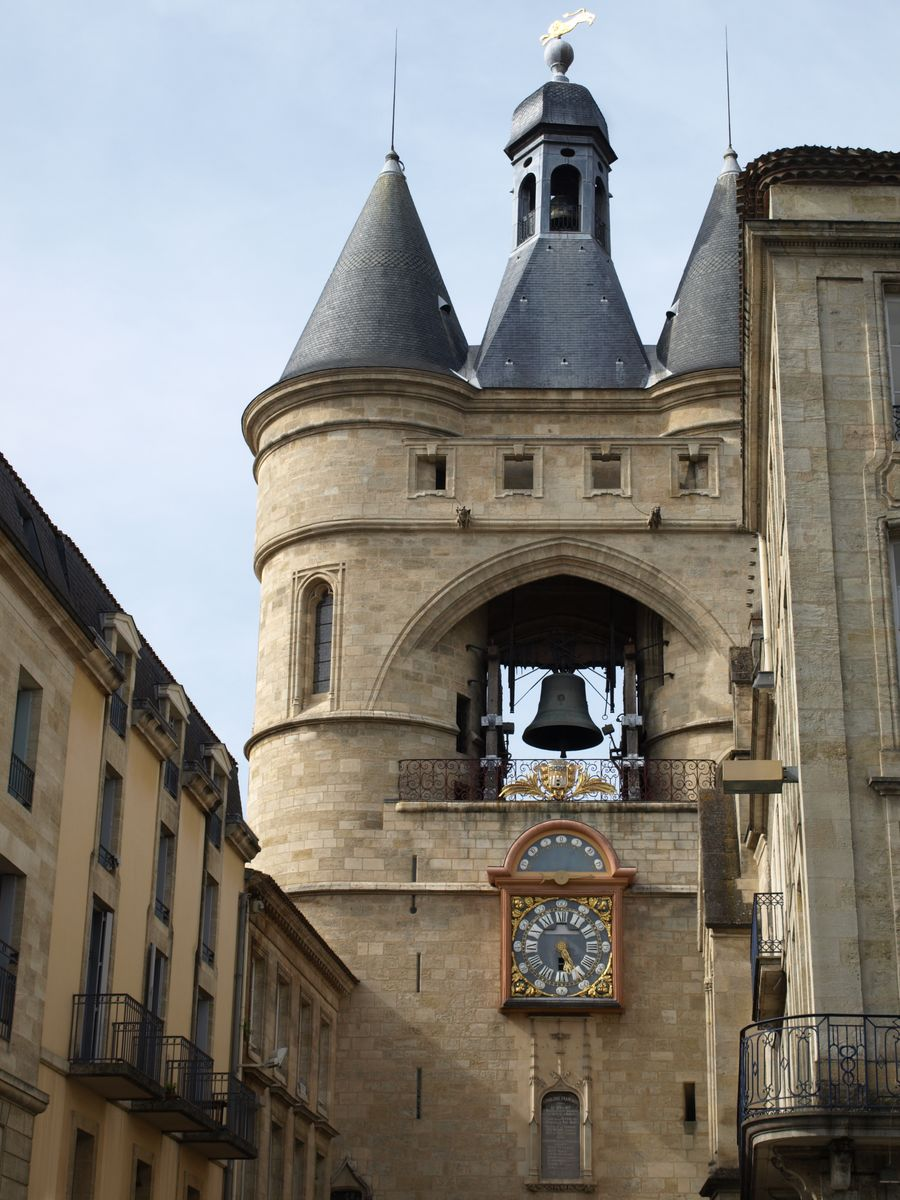 Bordeaux - Grosse Cloche - Porte Saint-Eloi